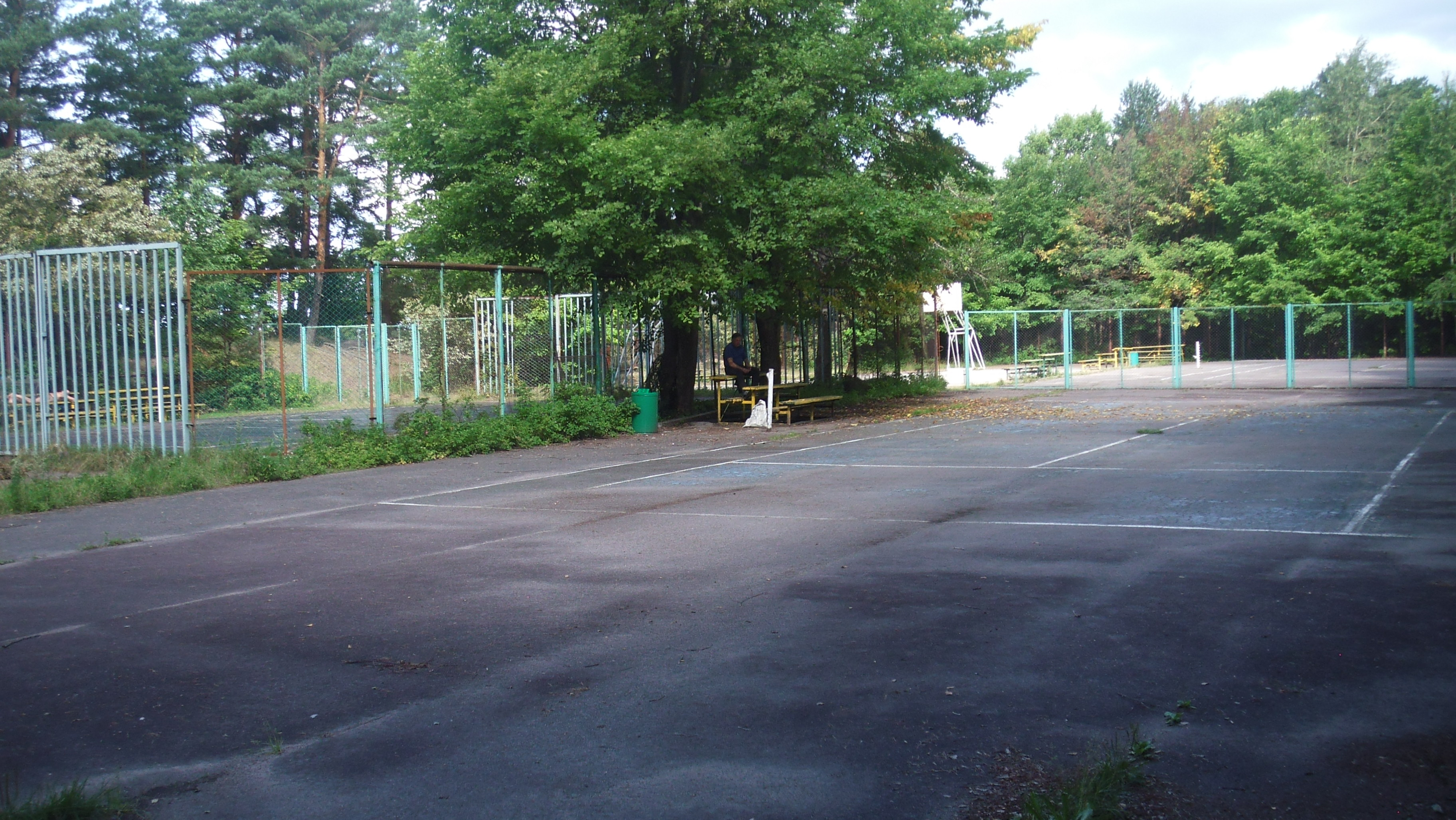 Сестрорецкий курорт место курзала